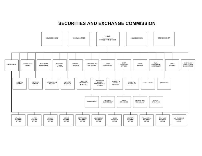 Skipurit SEC